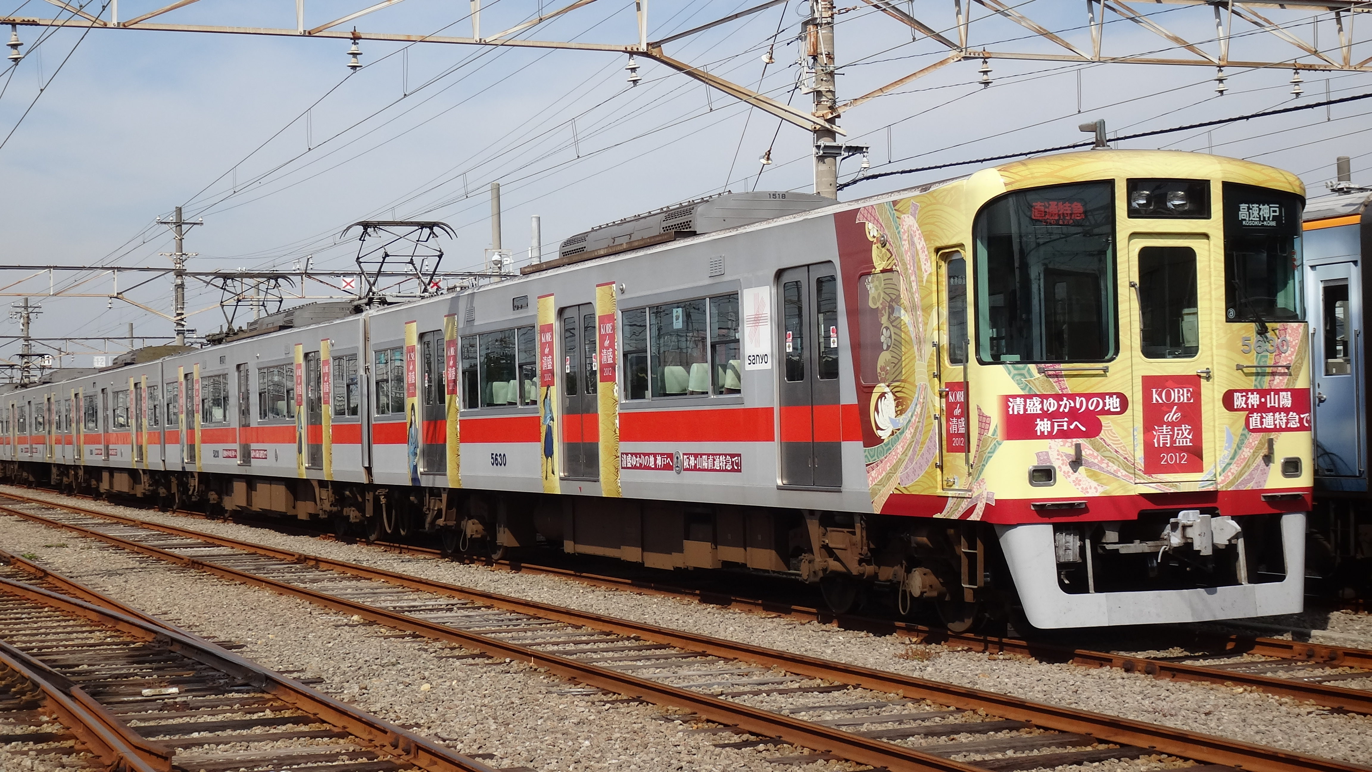 山陽電鉄・5030系ラッピング車両「ＫＯＢＥ ｄｅ 清盛」 東二見車両基地・イベントにて撮影